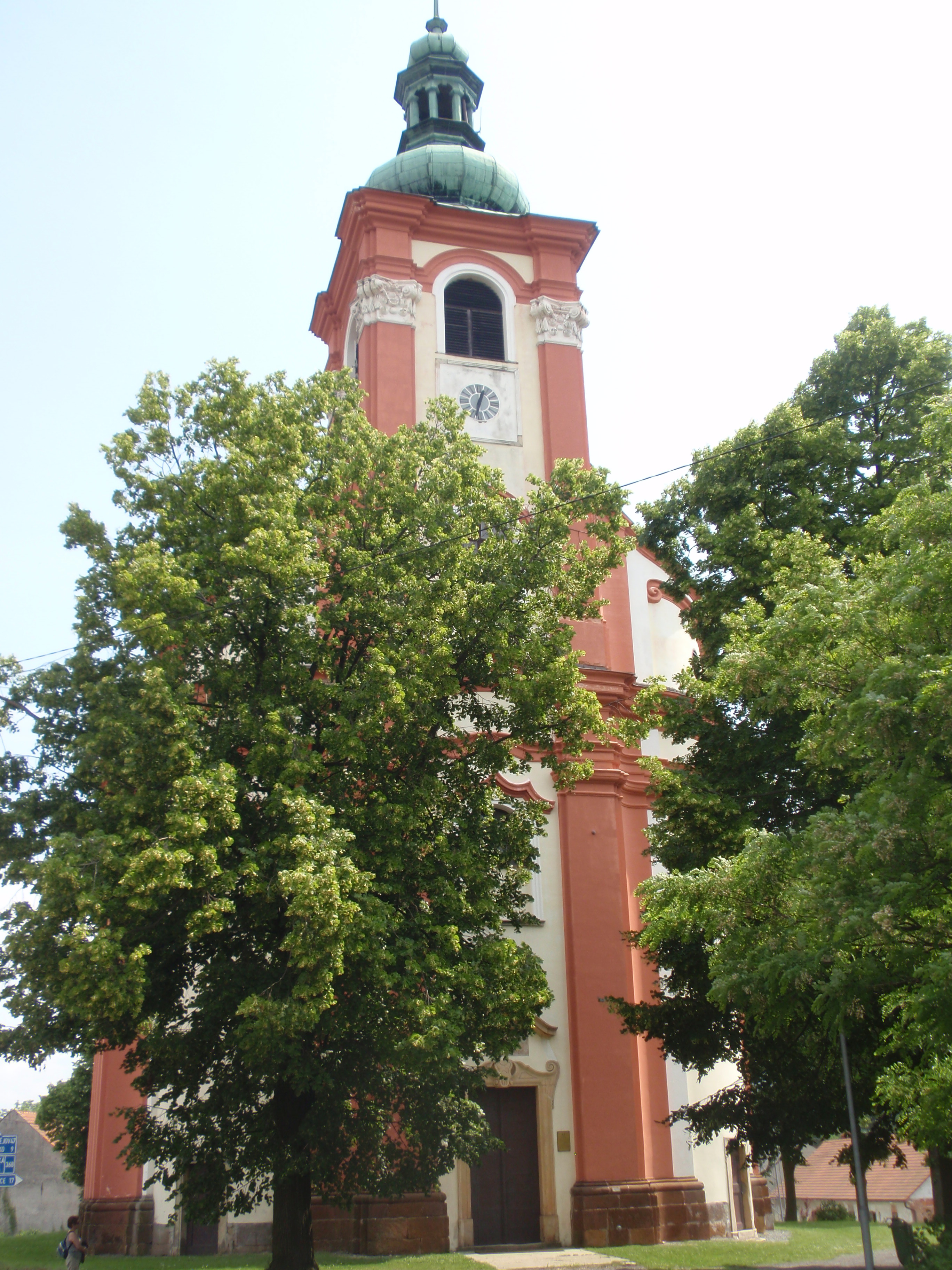 Kostel sv. Jana Křtitele (Křenov), náves, Křenov